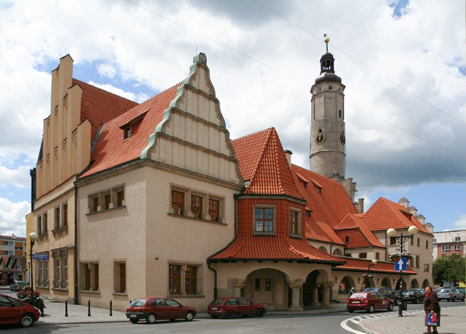 Lwówek Śląski, ratusz, stan na 2010 r., fot. P. Roczek.